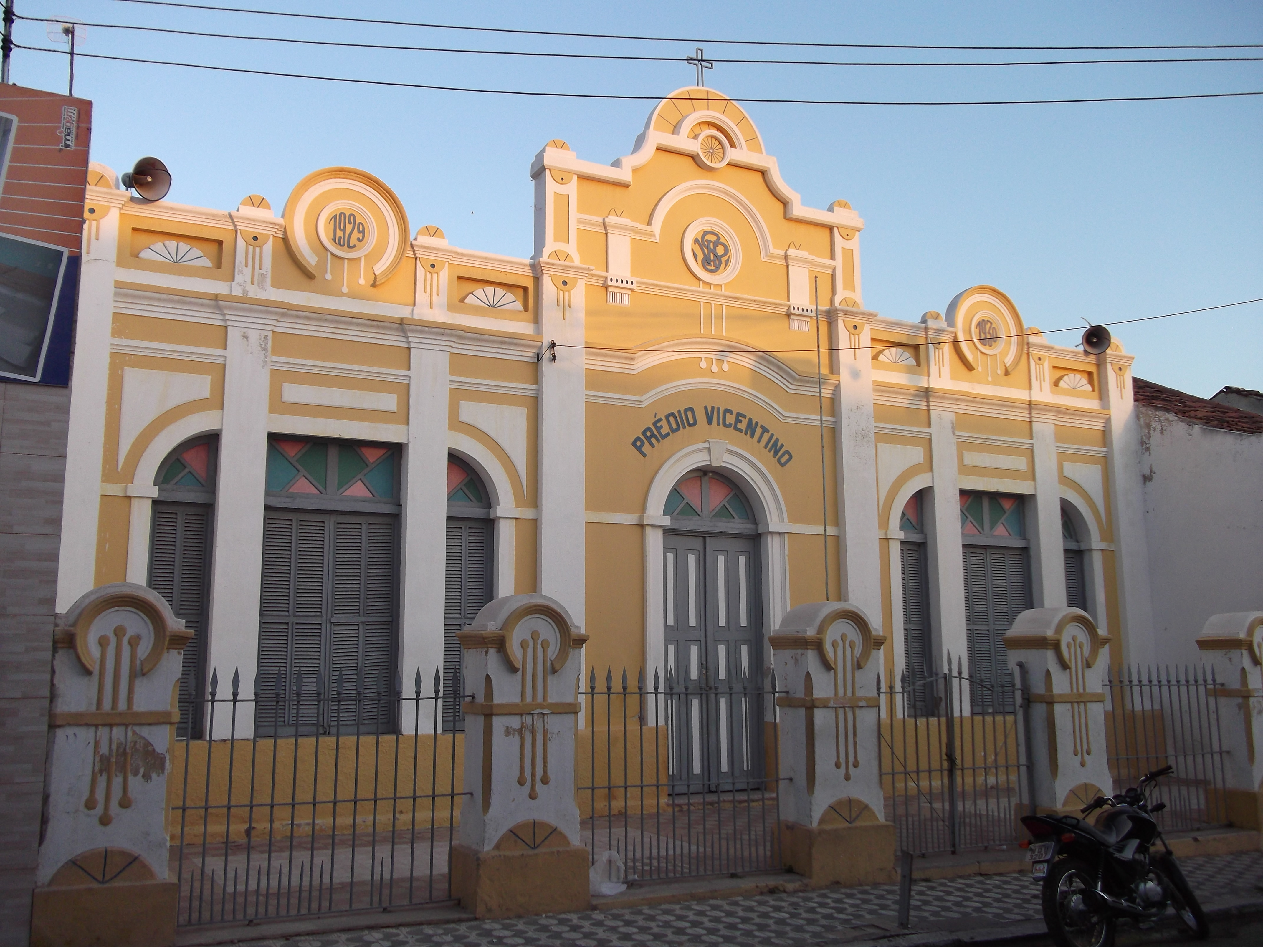 Prédio Vicentino, Canindé, Ceará, Brasil